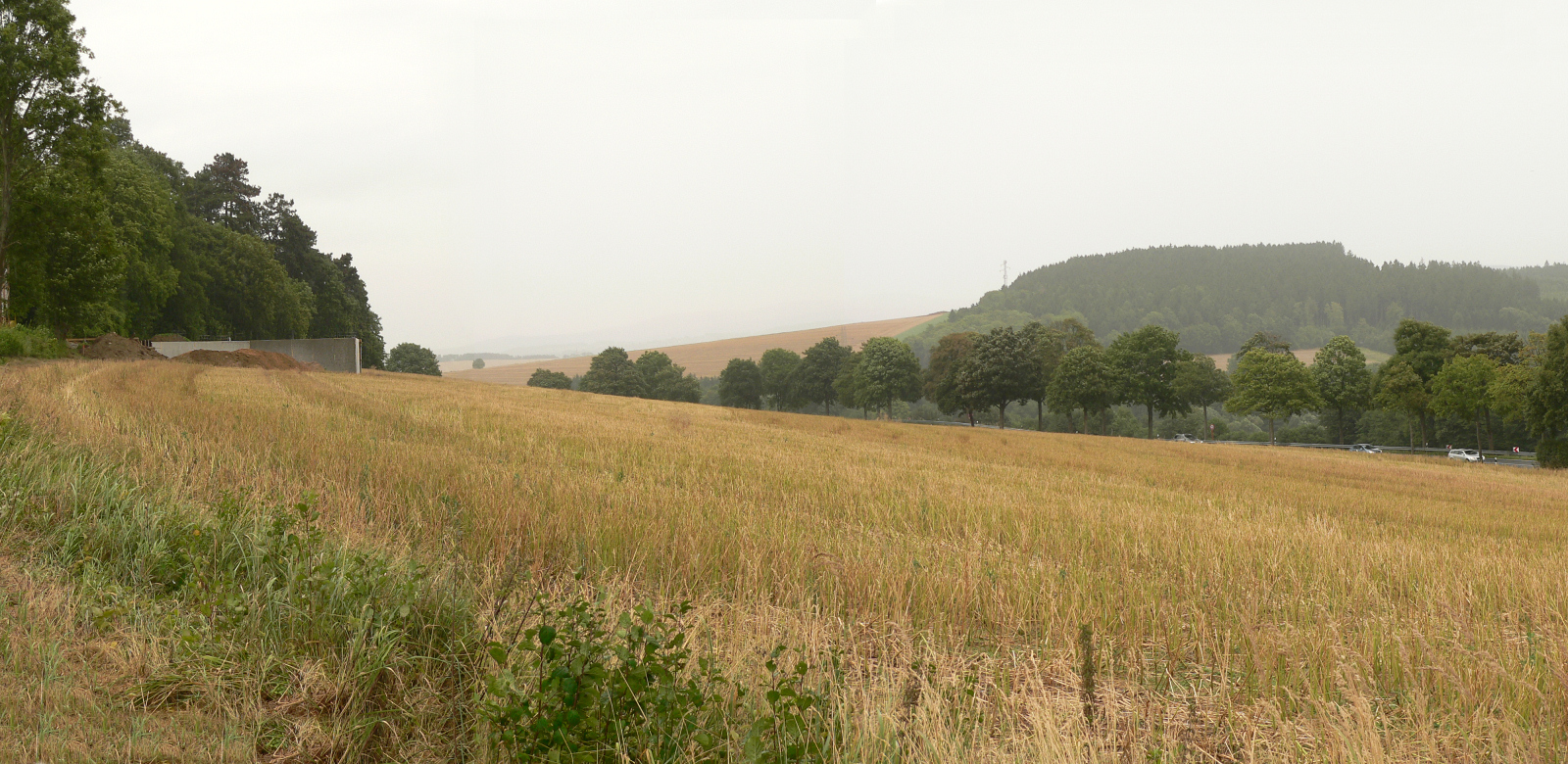 Harzhorn links und Rodenberg rechts, dazwischen B 248 (sichtbar) und A 7 (nichts sichtbar)